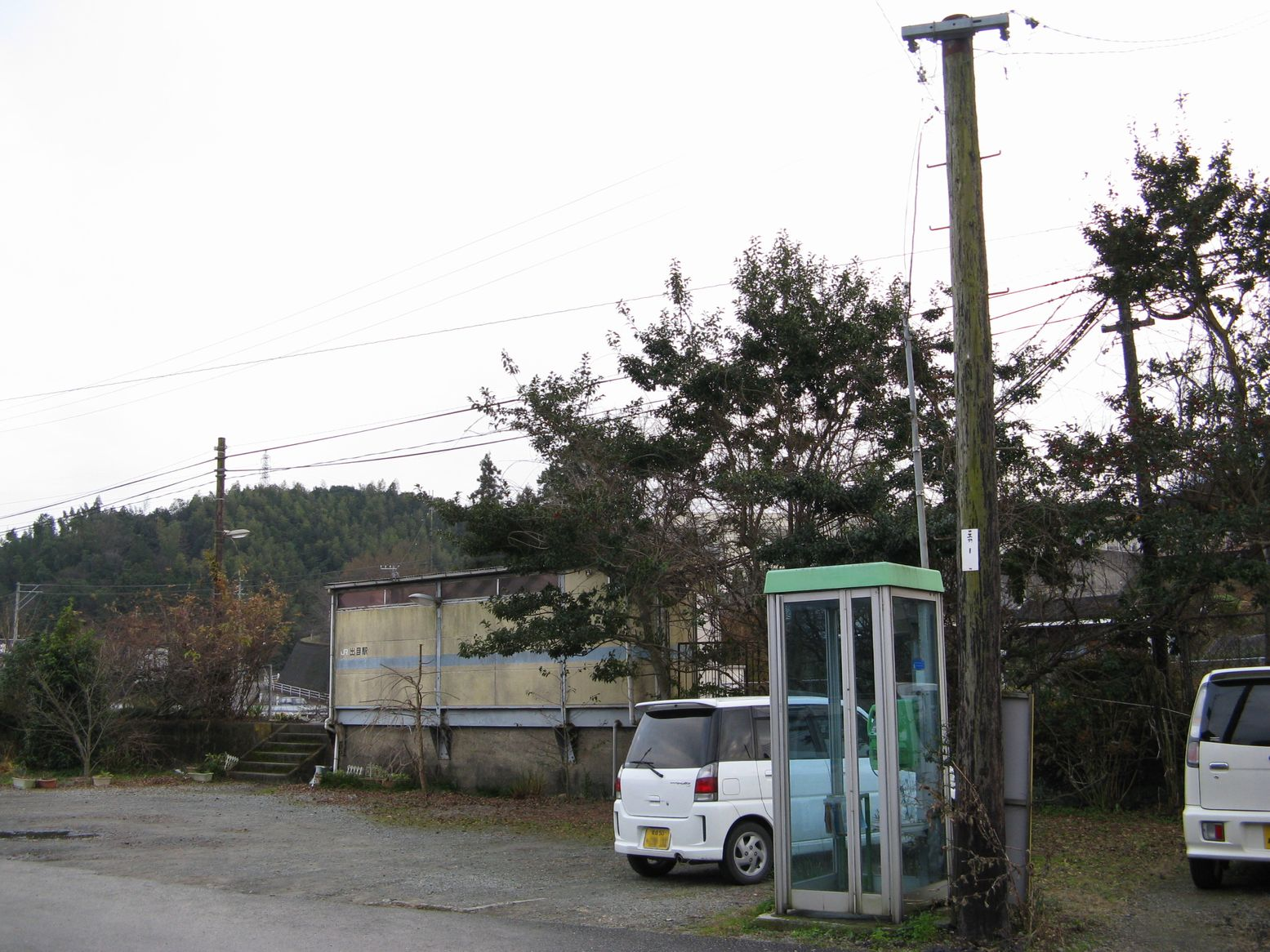 予土線出目駅 手前に駅舎の土台跡がかすかに見える